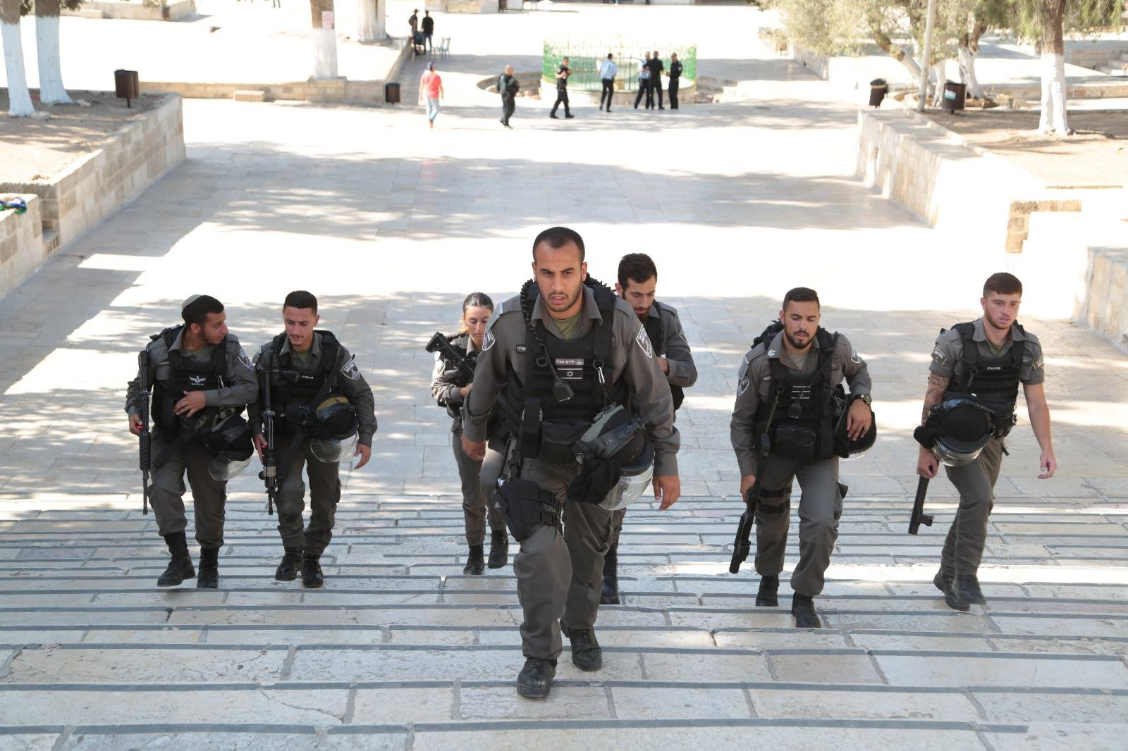 Jerusalem